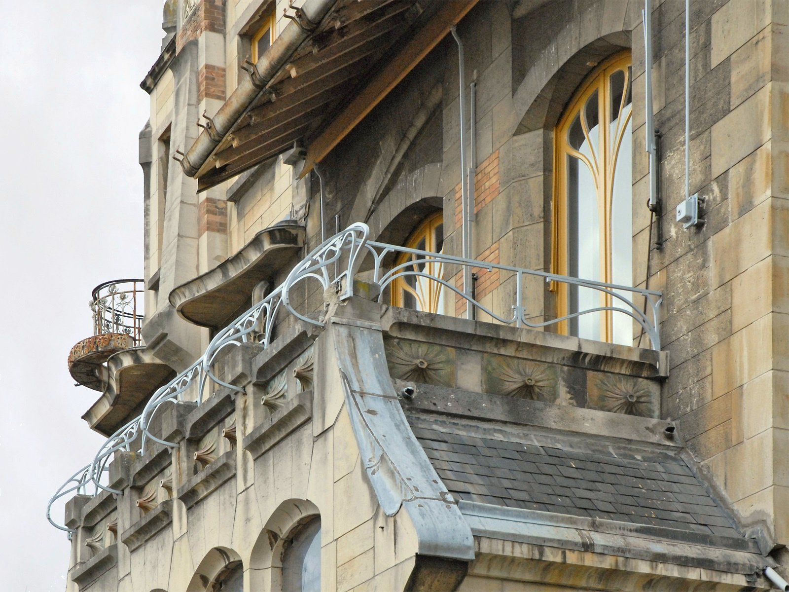 La villa Majorelle a été commandée en 1898 par Louis Majorelle (1859-1926) , elle a été construite de 1900 à 1901, par Lucien Weissenburger (1860-1929) , architecte d' exécution à Nancy, d' après des plans d' Henri Sauvage (1873-1932) , architecte à Paris et gendre d'Alexandre Charpentier, artiste art nouveau reconnu. Il s'agissait de la maison d'habitation de Louis Majorelle et de sa famille ainsi que de son atelier, situé au dernier étage et disposant d'une très large baie vitrée orientée au nord. Le plancher sur caves en béton armé a été exécuté par l' entreprise nancéienne France Lanord et Bichaton concessionnaire du système Hennebique, également auteur du gros-oeuvre. La céramique a été exécutée par Alexandre Bigot (1872 1927) fabricant à Mer (41). L'ébénisterie et les ferronneries ont été conçues et réalisées par l' entreprise nancéienne de Louis Majorelle. Les verrières sont de Jacques Gruber (1870 1936) ; Le décor a été peint par Francis Jourdain (1876 1958) peintre à Paris et Henri Royer (1869 1938) peintre à Nancy. La villa Majorelle est occupée par les services du ministère de la culture (SDAP) et n'est visitable que le week-end sur rendez-vous à prendre au musée de l'Ecole de Nancy. Les photos sont interdites à l'intérieur. Seule la partie gauche de la villa a été restaurée. Les ajouts et modifications effectués par les services de l'Equipement, bien avant son classement en 1996 comme monument historique, n'ont pas été supprimés à ce jour mais il semble que le projet complet de restauration soit envisagé.